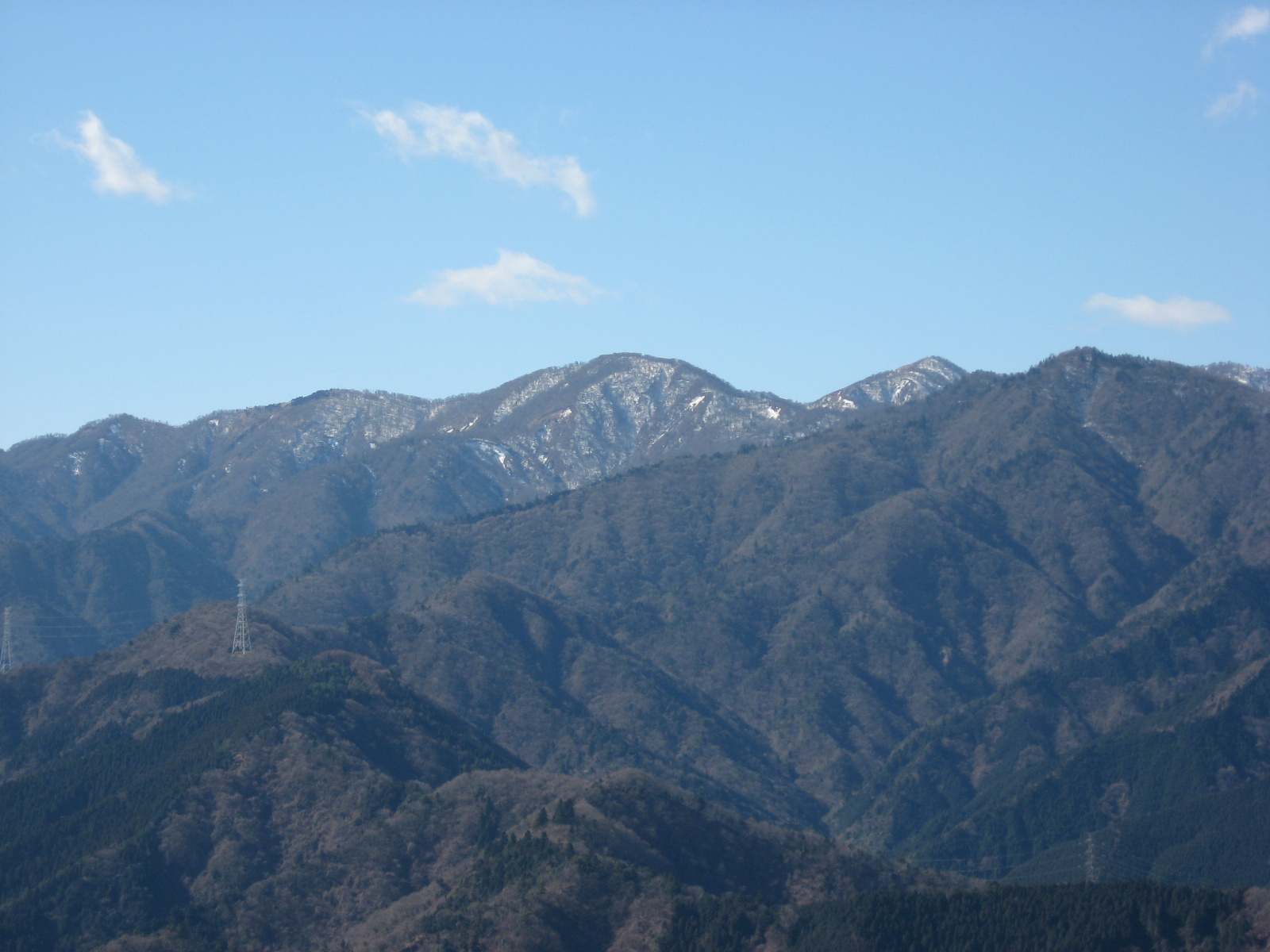 高取山から見た丹沢山